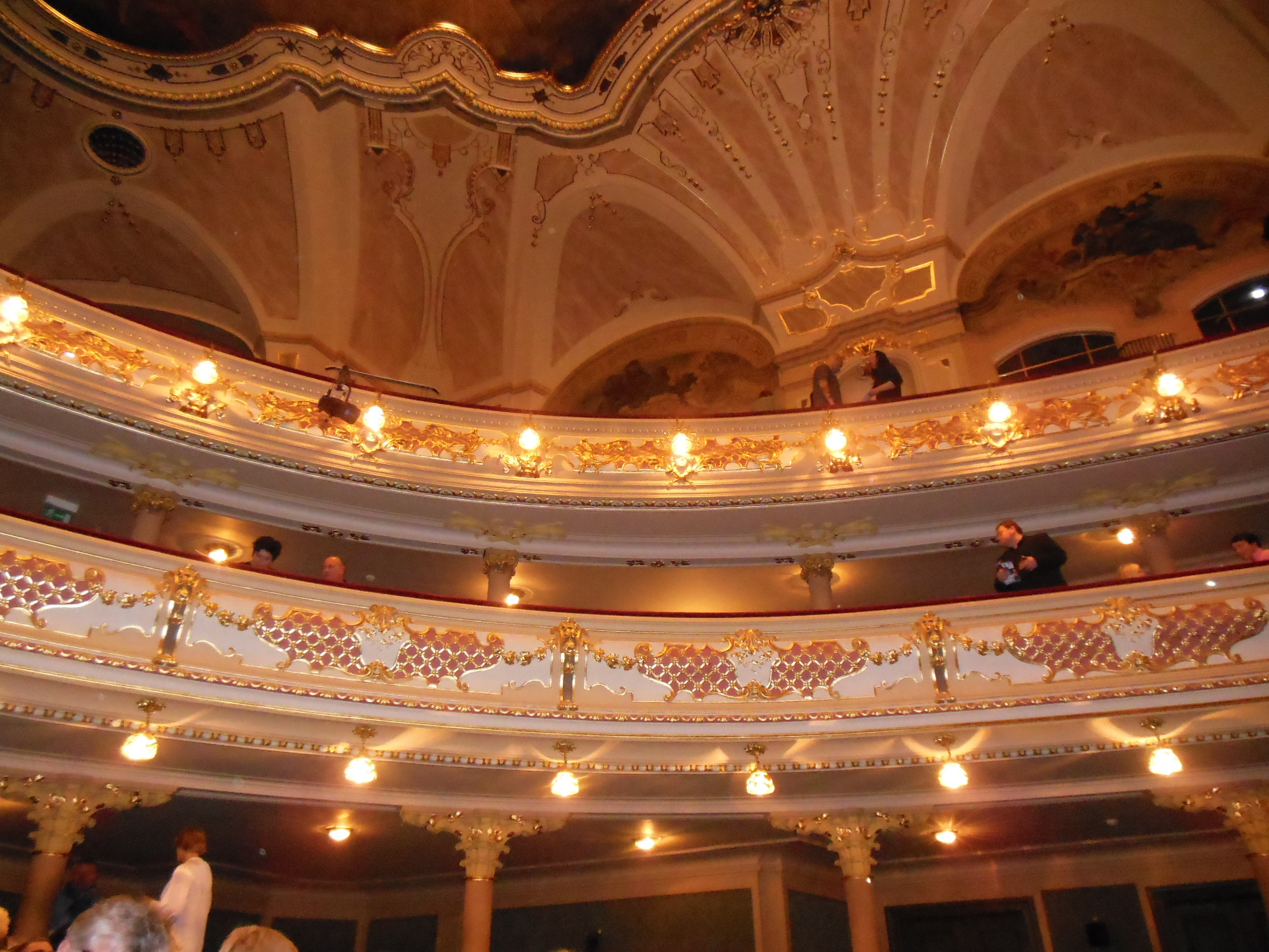 Praha-Karlín. Ulice Křižíkova, Hudební divadlo Karlín (HDK), hlavní sál.